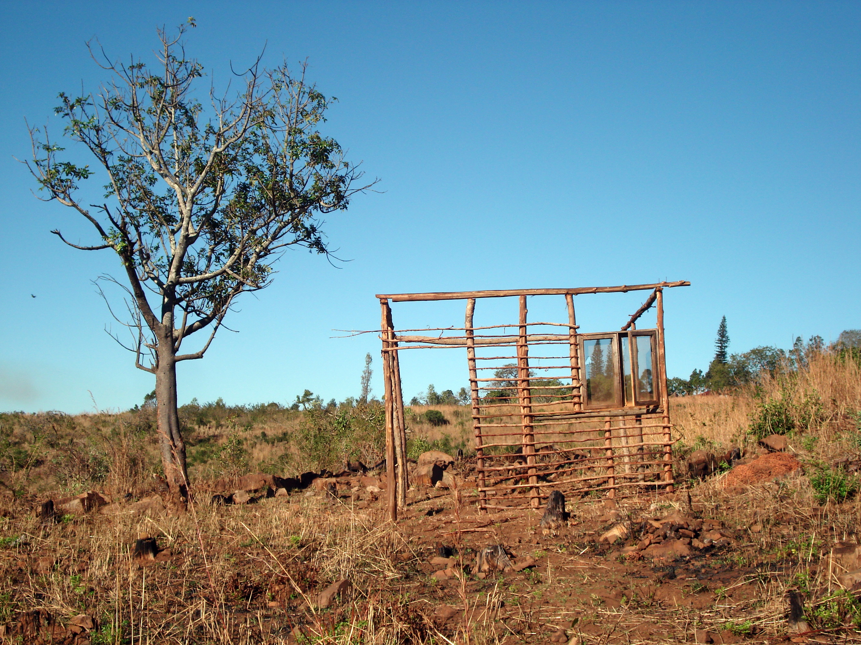 Sprehod čez Afriško savano. Savana v Namaachi